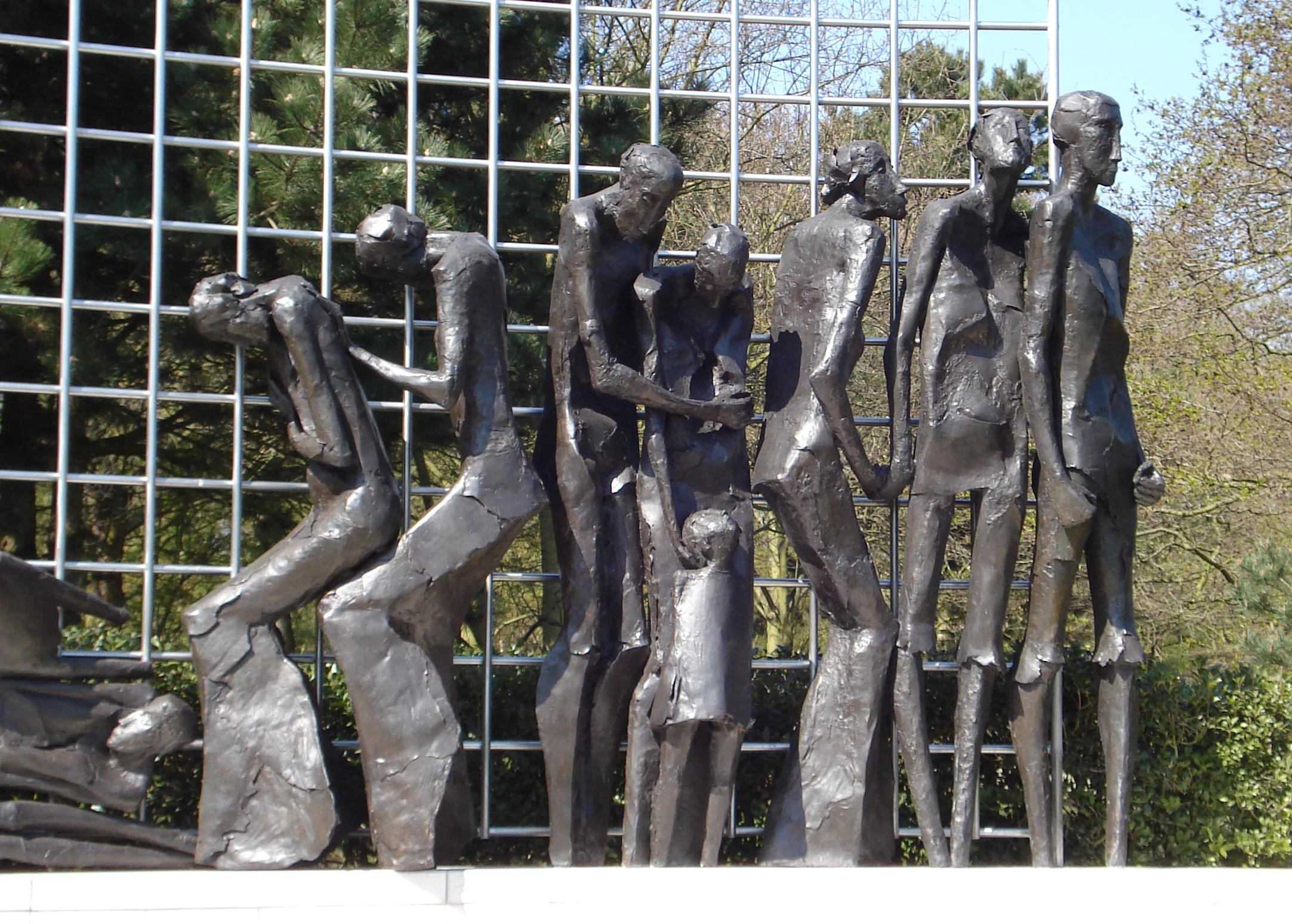 Den Haag, Prof. Teldersweg, Scheveningse Bosjes. Indisch monument van Jaroslawa Dankowa. 1989. The Hague/The Netherlands.